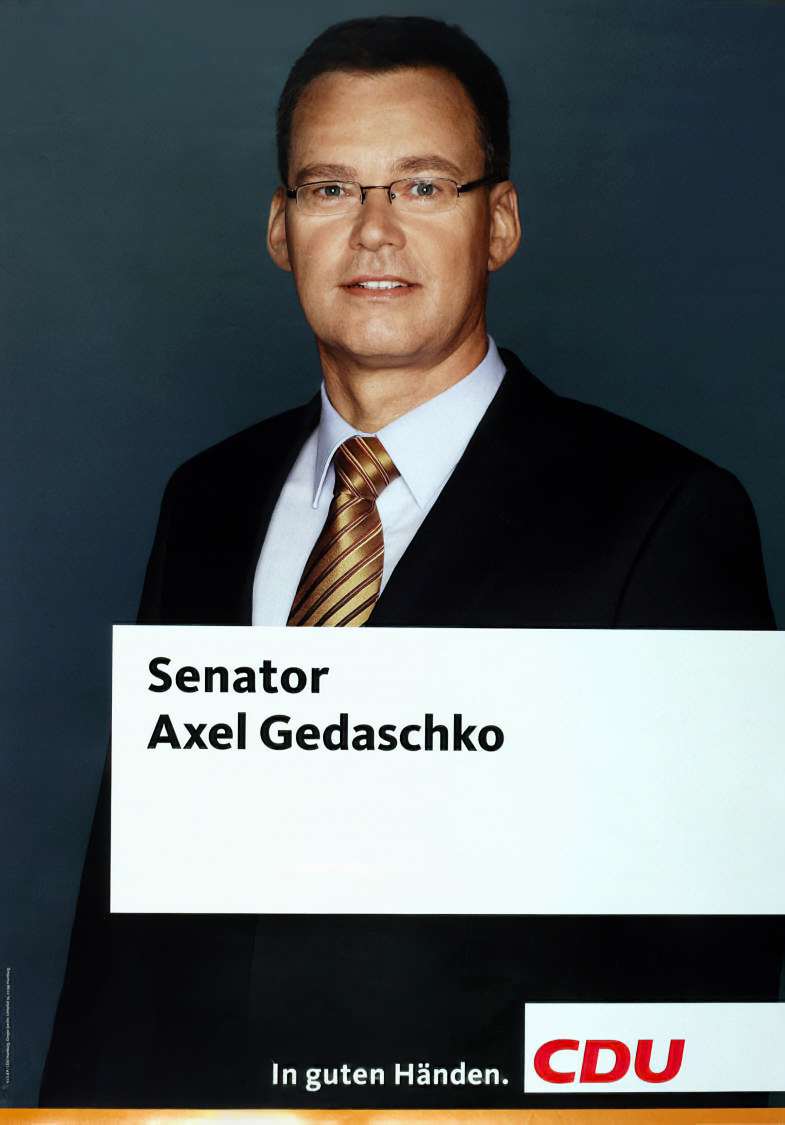 Senator Axel Gedaschko In guten Händen. CDUAbbildung:FotoPlakatart:Kandidaten-/Personenplakat mit PorträtAuftraggeber:V.i.S.d.P.: CDU Hamburg, Gregor Jaecke, HamburgObjekt-Signatur:10-006 : 1836Bestand:Plakate zu Bürgerschaftswahlen Hamburg ( 10-006)GliederungBestand10-18:Plakate zu Bürgerschaftswahlen Hamburg (10-006) » CDULizenz:KAS/ACDP 10-006 : 1836 CC-BY-SA 3.0 DE